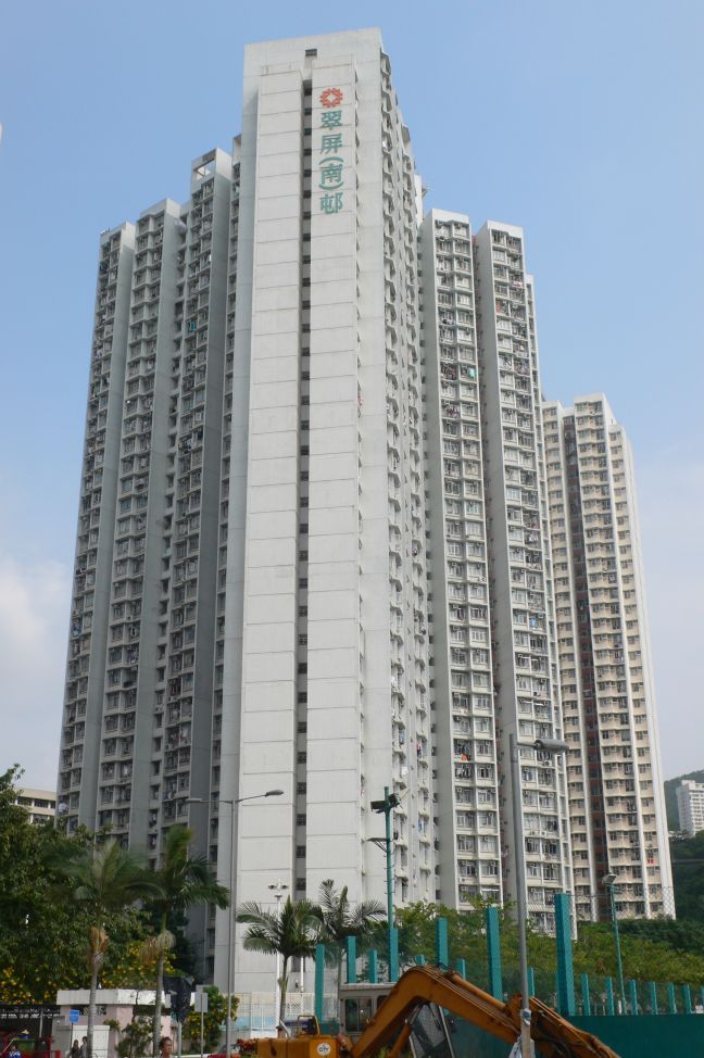 Tsui Ping (South) Estate, Tsui Lok Building, Kwun Tong, Hong Kong